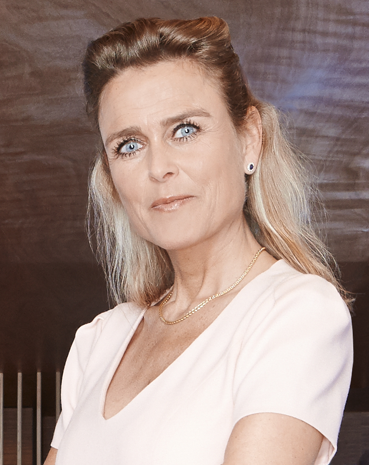 Portret van Barbara Baarsma, gemaakt door Rene van der Hulst voor Elsevier op 31-03-14.